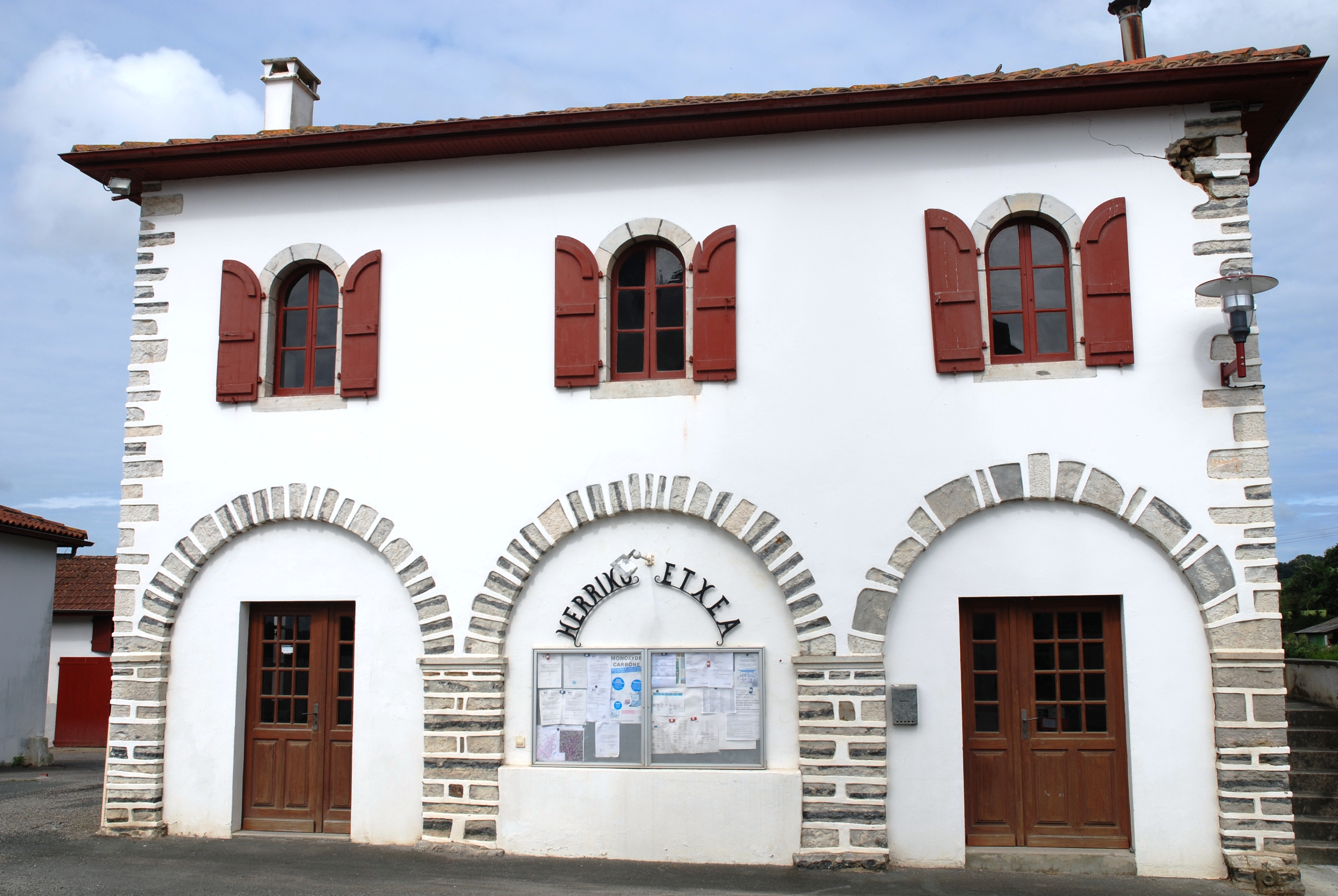 La mairie d'Amorots-Succos, à Amorots